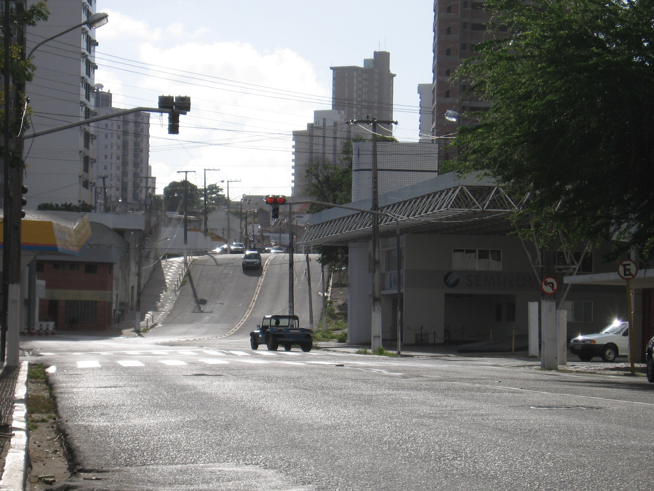 Avenida Gustavo Cordeiro de Fárias (e a "famosa" "ladeira da barriguinha") em Natal, Rio Grande do Norte, Brasil